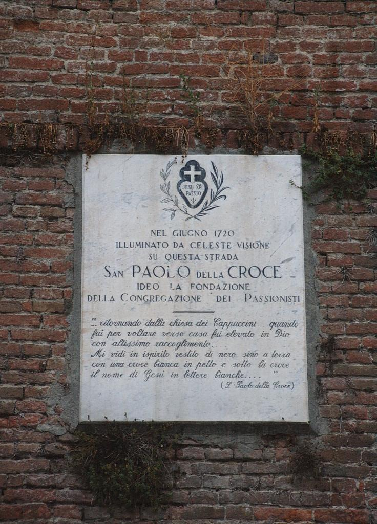 Targa di ricordo del posto dove San Paolo della Croce ebbe l'idea di Fondare l'ordine dei Padri Passionisti